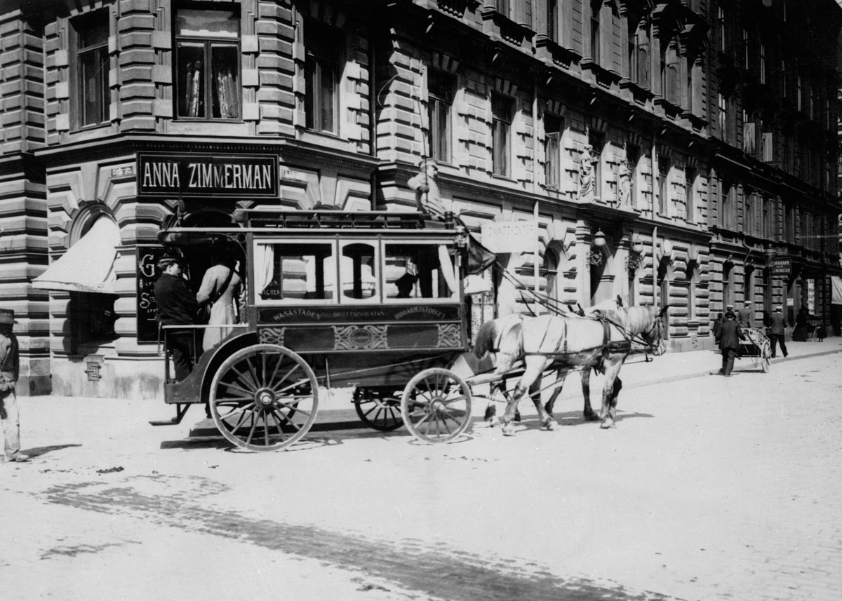 Hörnan Upplandsgatan/Observatoriegatan, maj 1902. Stockholms Allmänna Omnibus AB:s vagn på linjen Odenplan-Riddarhustorget.